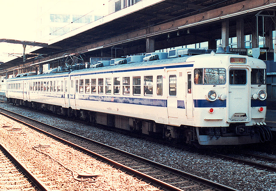 JR九州 クモハ475-31+モハ474-31+クハ455-604 臨時急行「ひのくに」